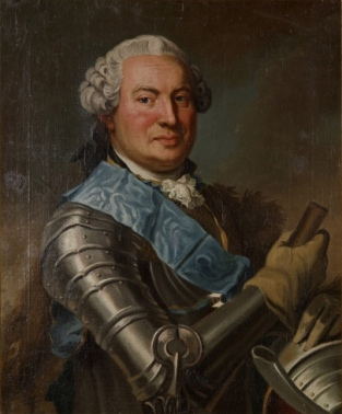 Porträtt av Gustaf David Hamilton (1699-1788) iklädd rustning. Över axeln bär han Serafimerordens band och runt halsen syns även Svärdsorden. Målning av Carl Fredrich Brander från ca 1760. Olja på uppfodrad duk, 75 x 63. Proveniens: Huseby bruk.